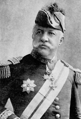 César Canevaro, (1846-1922), militar y político peruano. Peleo en la guerra del Pacífico, en la batalla de Tacna y en la defensa de Lima. Alcalde de Lima en varias ocasiones. Vicepresidente de la República en 1894-1895 y en 1919-1922.